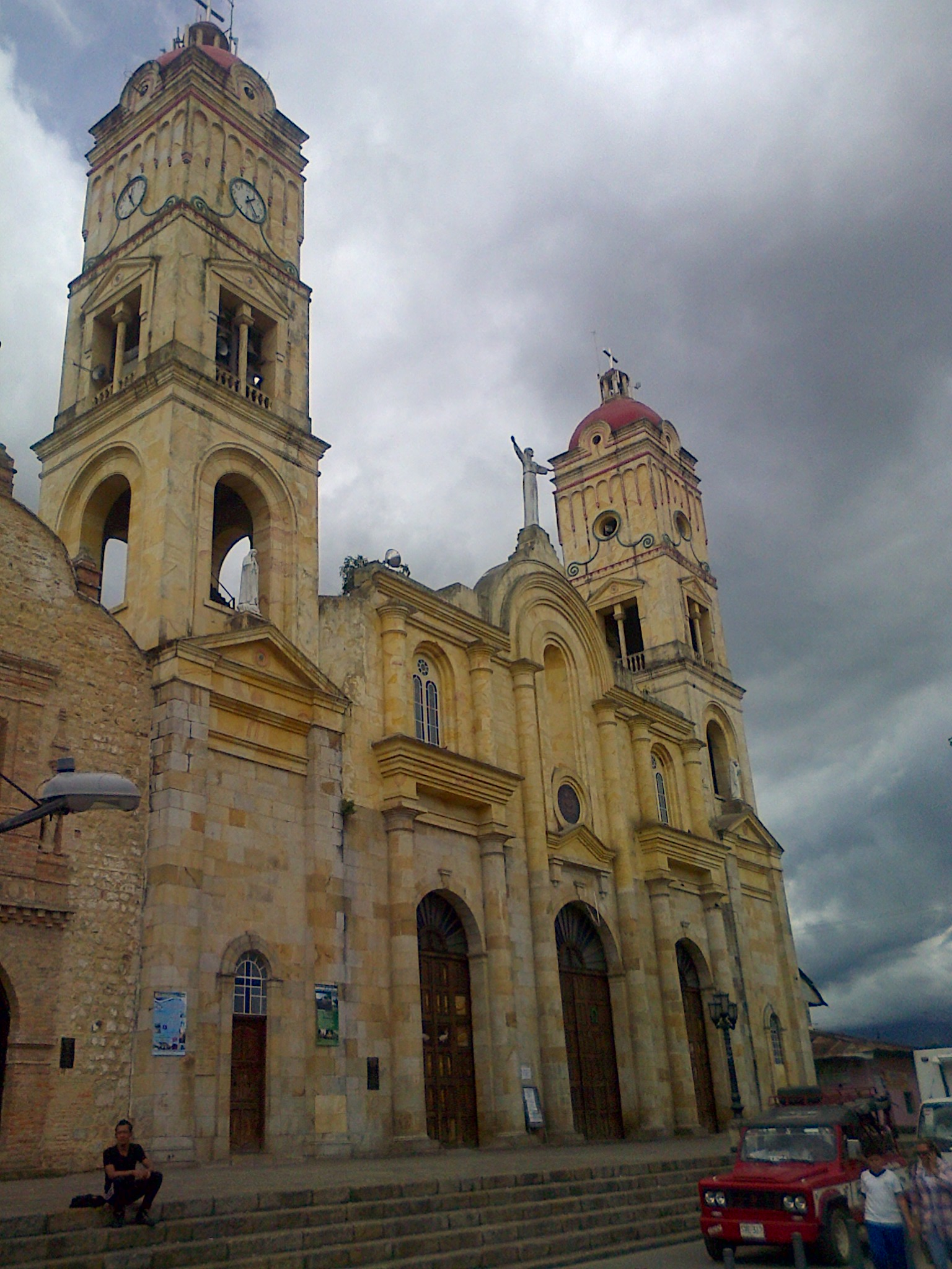 Fue creada el 16 de diciembre de 1649, segregándola de los pueblos de Tena-Guanza y de Ciénaga, hoy Santandercito. Su primer Cura fue Josep Severino Silva, posesionado el 4 de febrero de 1650. Esta parroquia tuvo los siguientes nombres: Nuestra Señora del Rosario, Paima y Calandaima, Santa Bárbara del Guayabal, Santa Bárbara del Guayabal de la Mesa, que fue el más común. La primera misa el día 1 ° de enero de 1910, con asistencia del Presidente de la República, General Ramón González Valencia y luego fue consagrado definitivamente el 9 de septiembre de 1917.